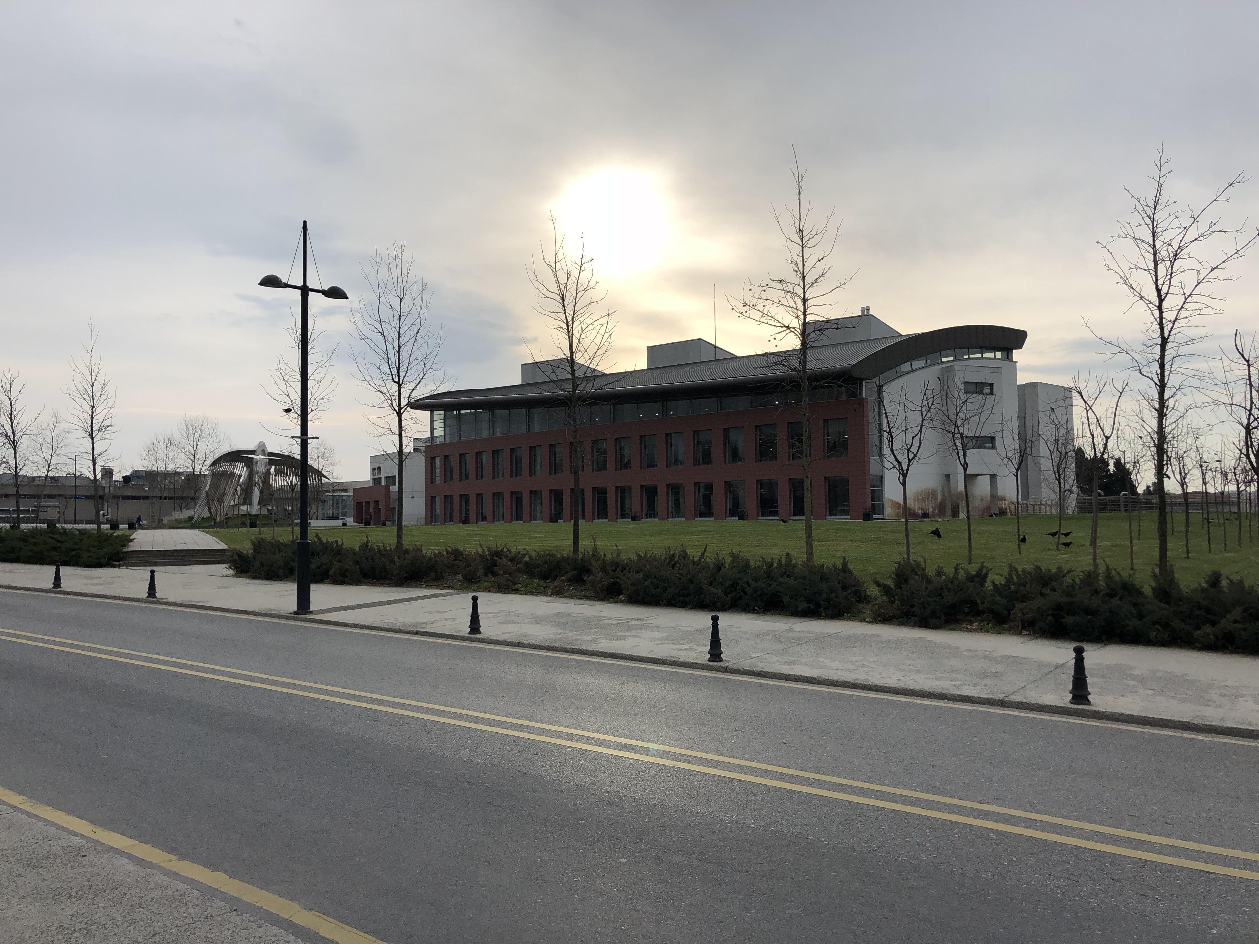 İstanbul Teknik Üniversitesi Mustafa İnan Kütüphanesi